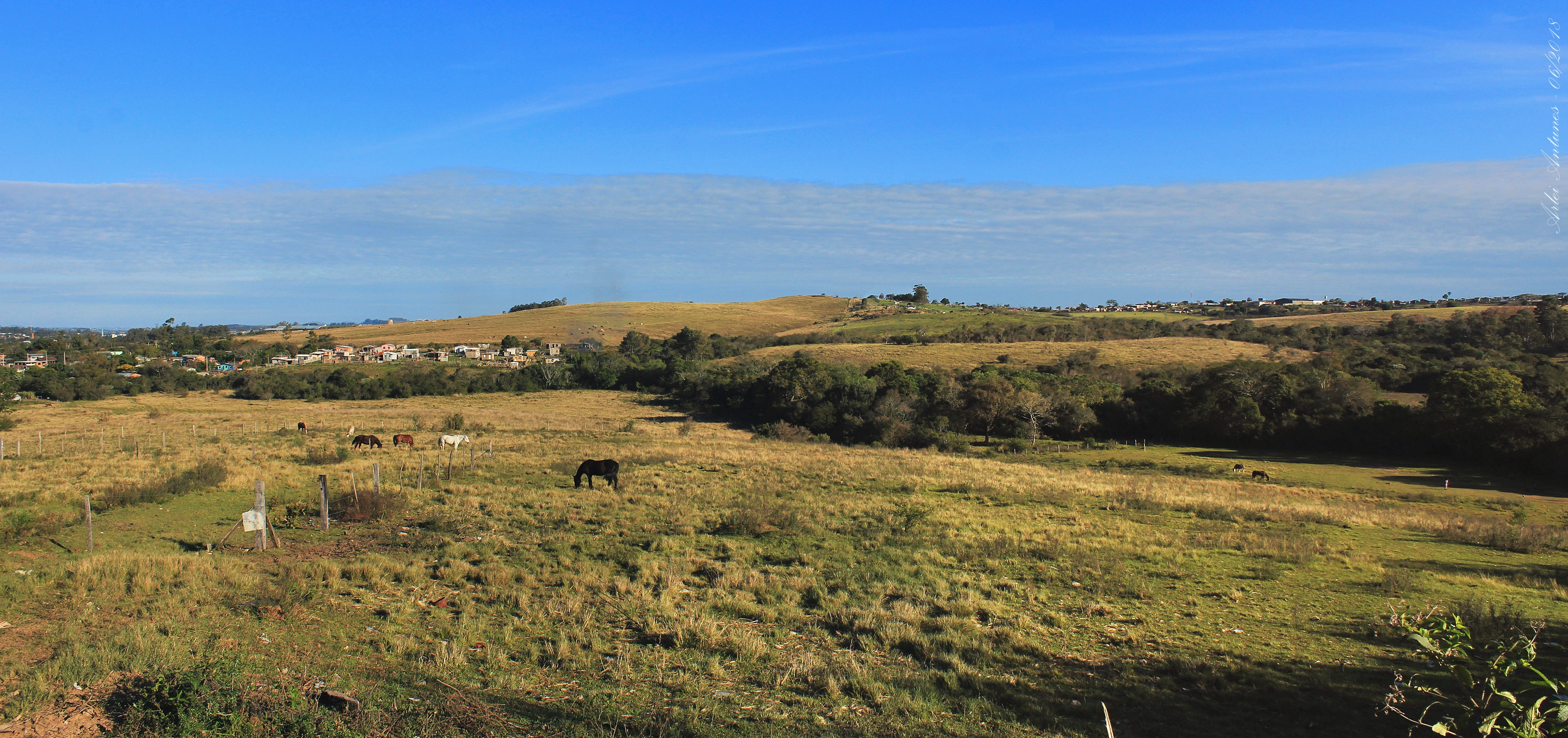 Ambiente característico do bioma pampa